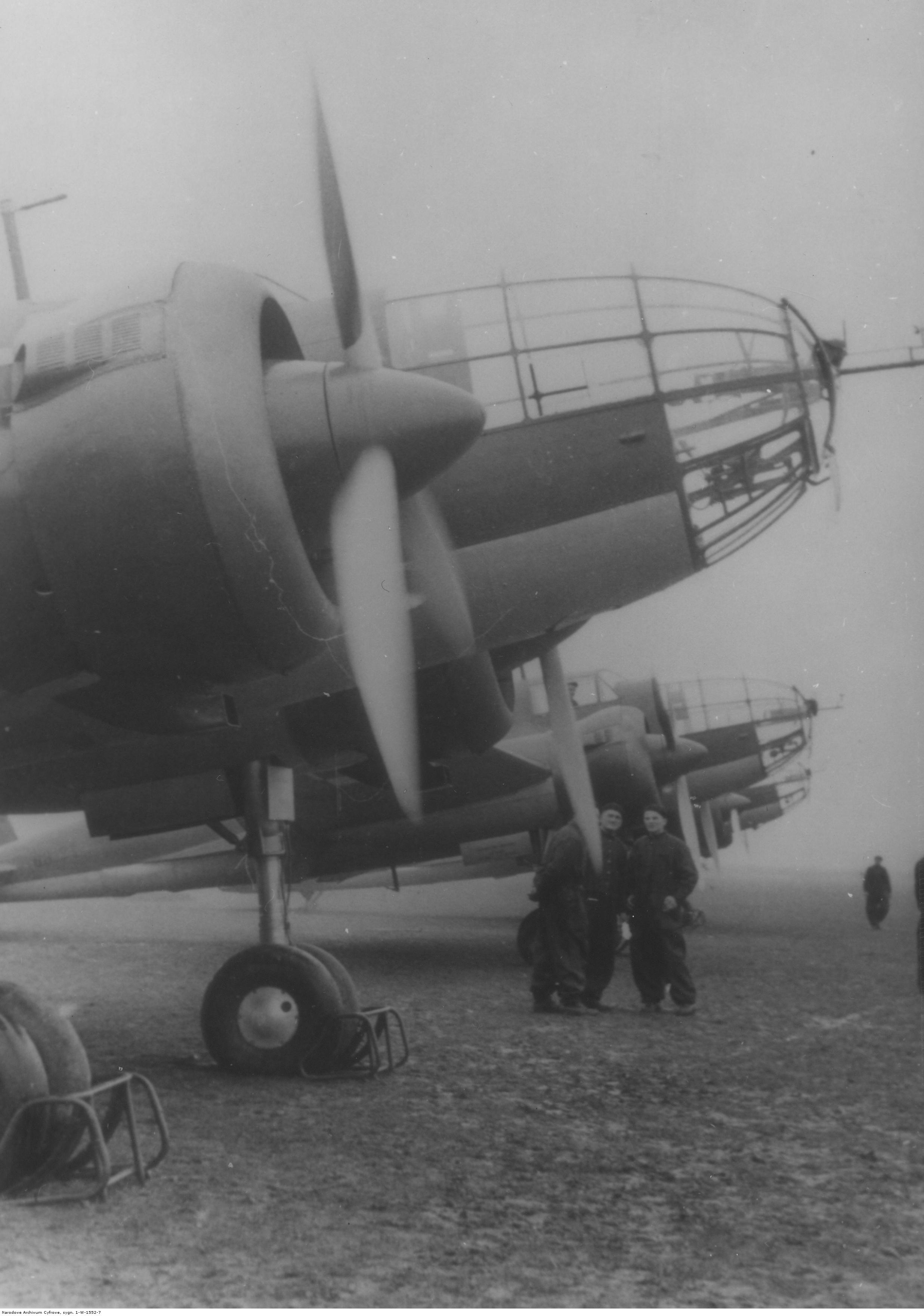 Obsługa techniczna samolotu PZL-37 Łoś przy maszynie.